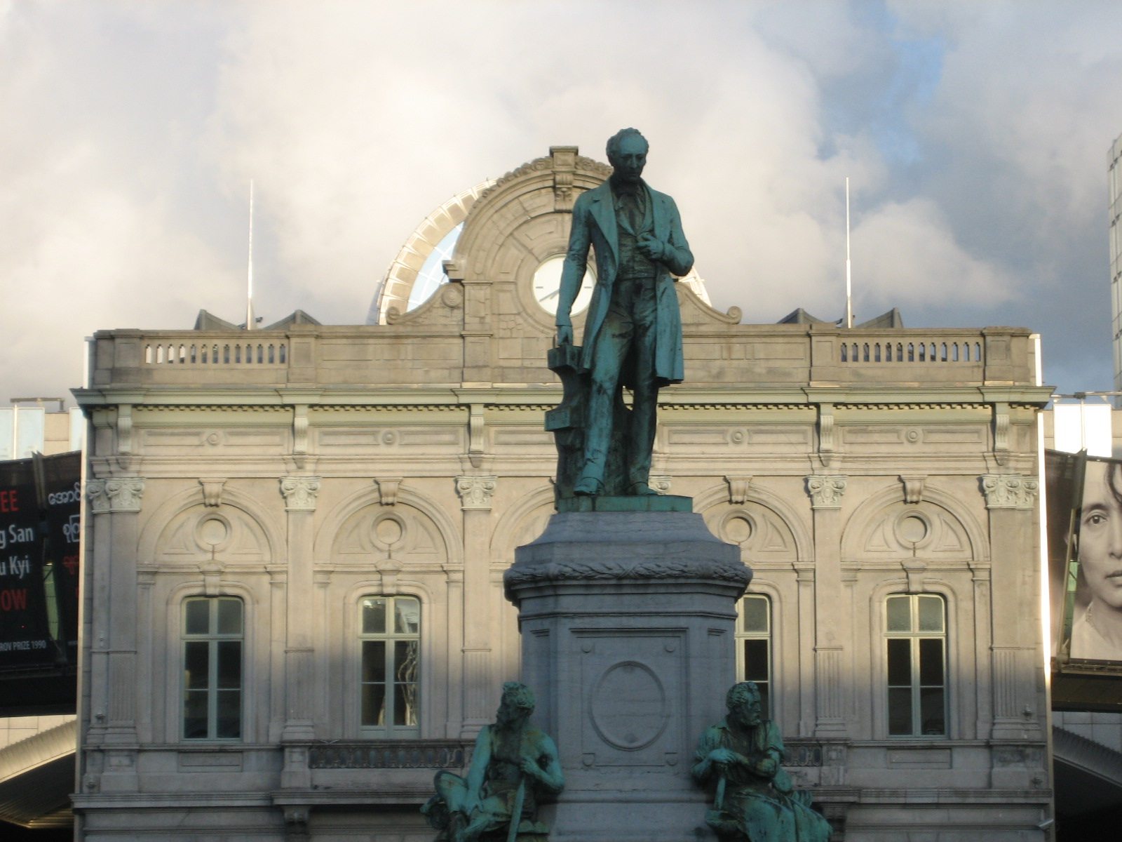 Monument fir den John Cockerill vum Armand Cattier (1872) op der Place du Luxembourg/Luxemburgplein zu Ixelles/Elsene, Regioun Bréissel (am Hannergrond: Historescht Gebai vun der Gare de Bruxelles-Luxembourg).